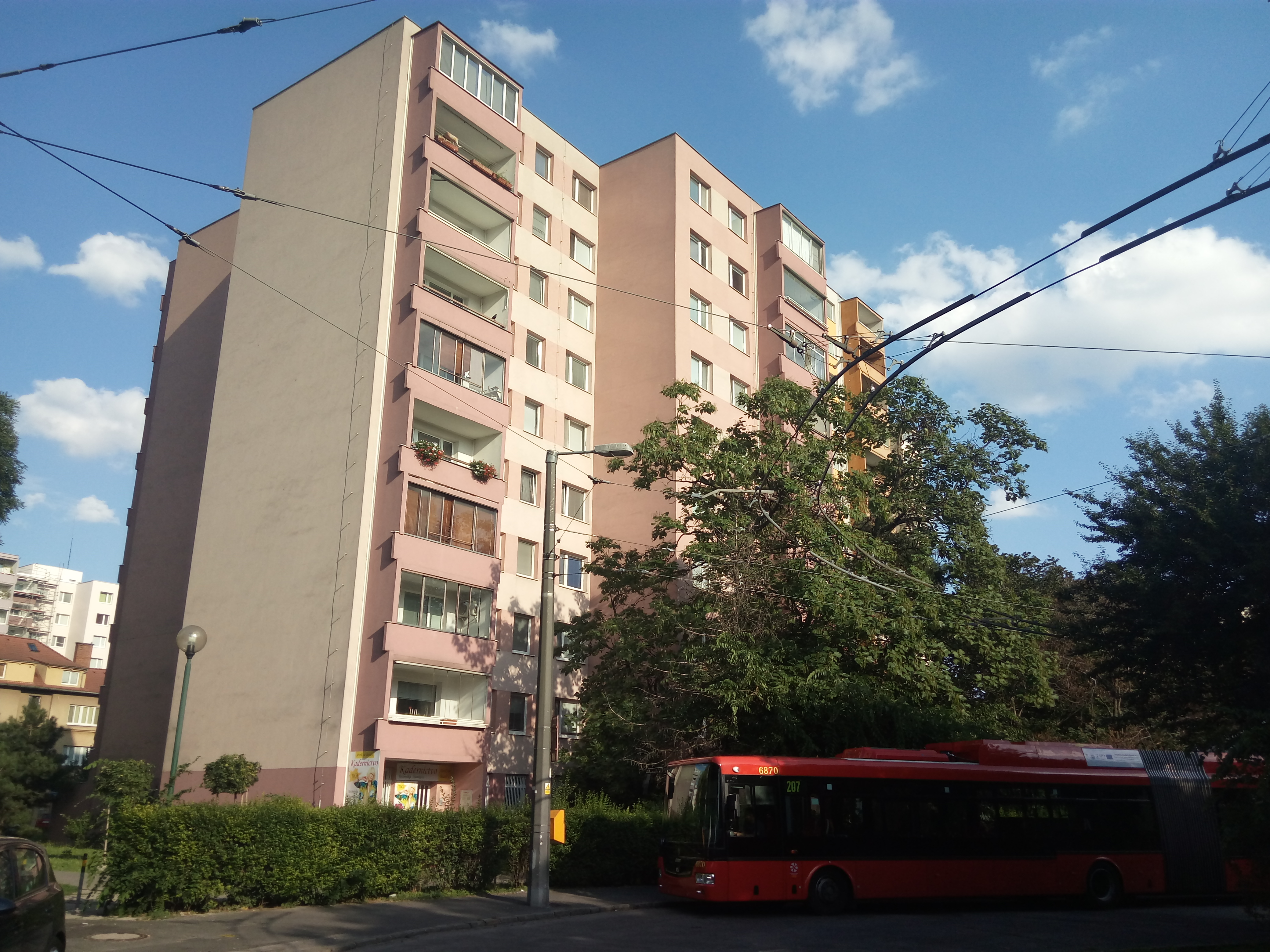 Jegého, Ružinov, Bratislava